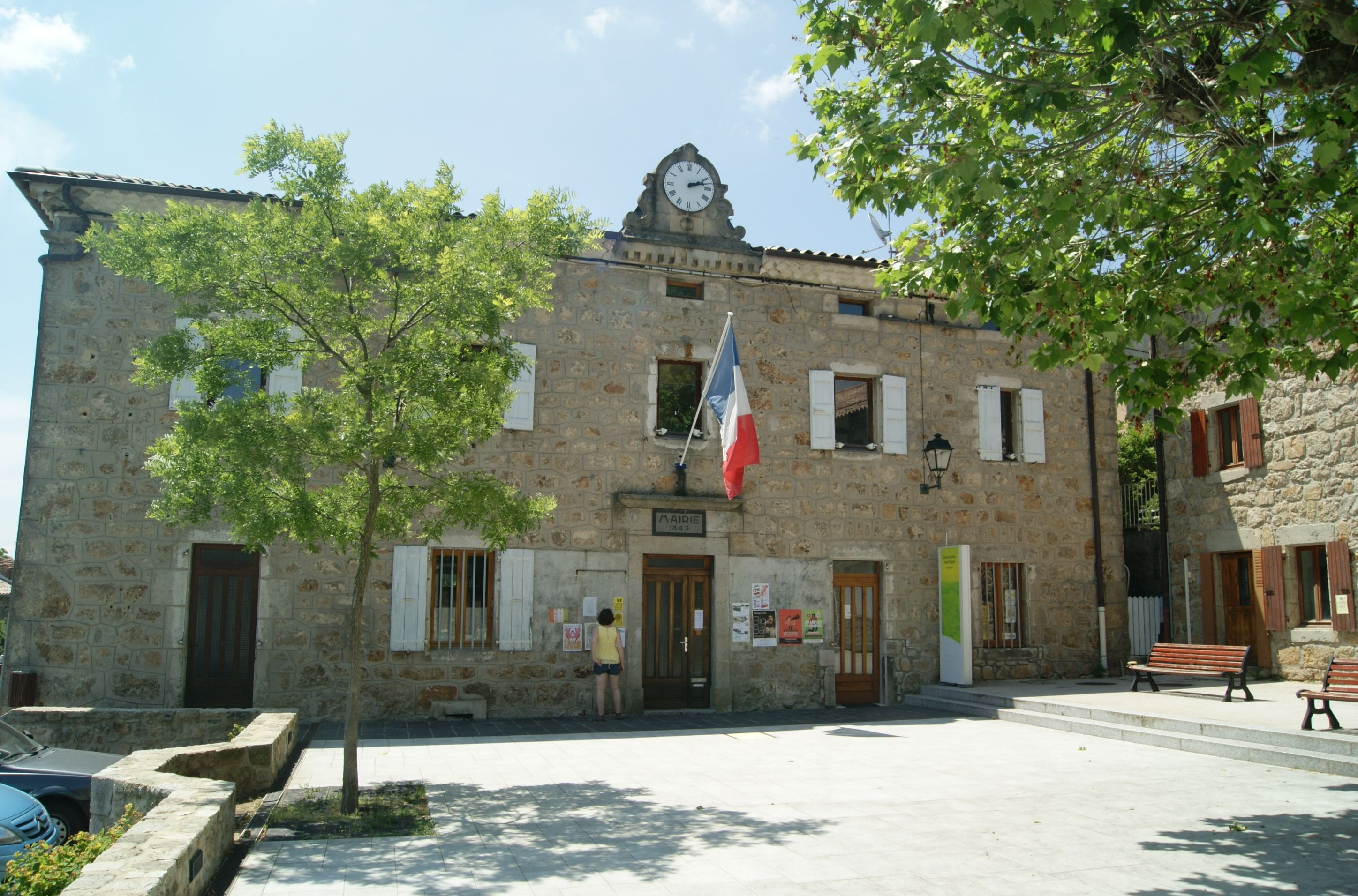 Mairie de Gluiras